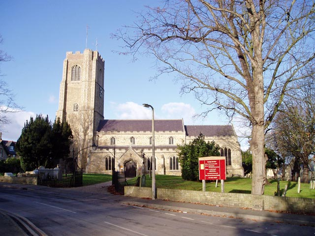 St George's Church, Littleport